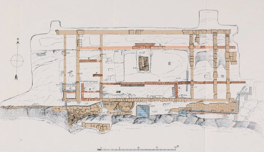 Planzeichnung des Asklepieions auf Paros von 1902, Kykladen, Griechenland